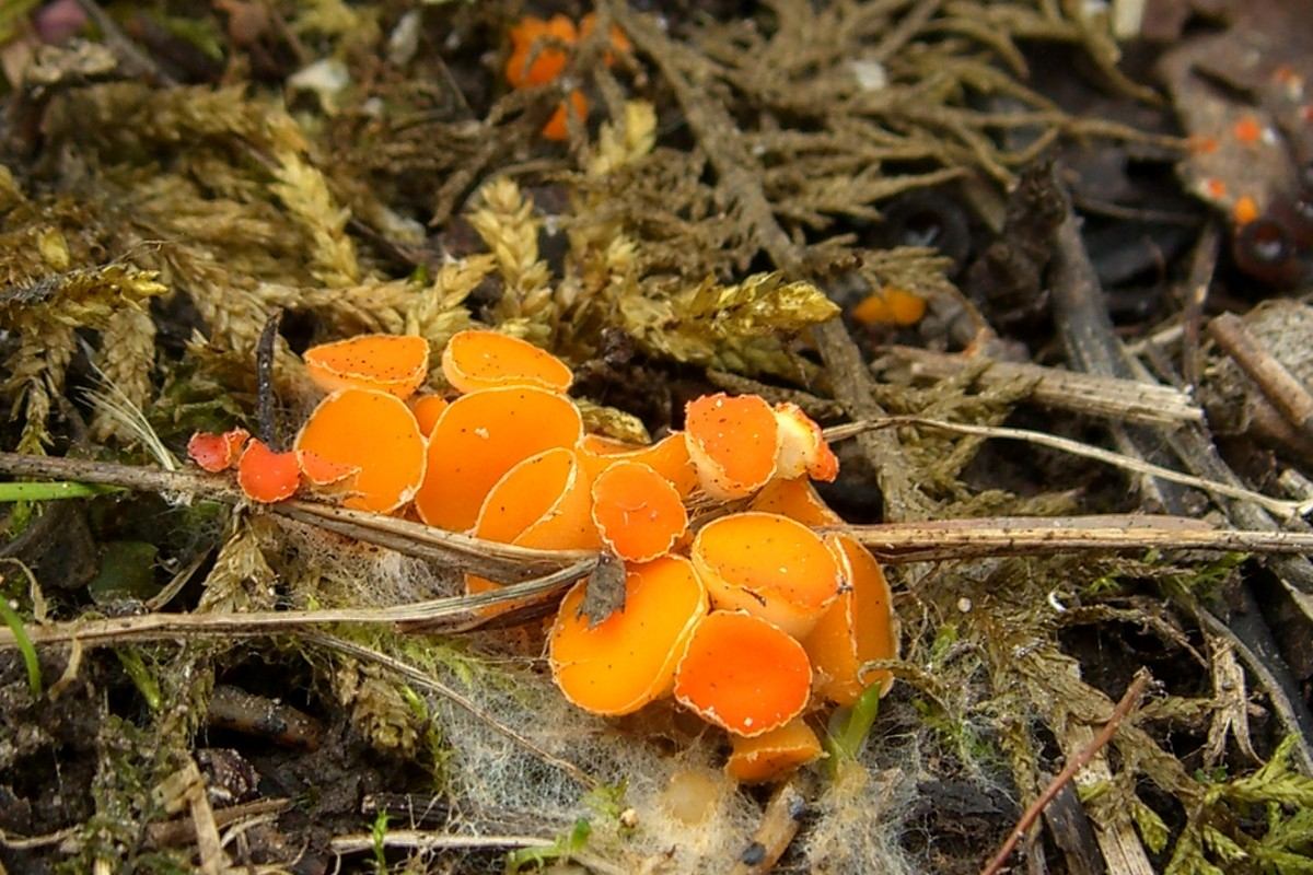 Byssonectria fusispora (Berk.) Rogerson & Korf